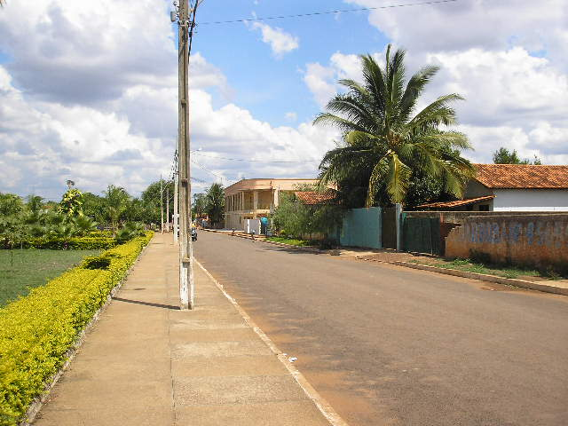 Rua da prefeitura e da praça central de Natalândia, Minas Gerais, Brasil. Autor: Denis A. C. Conrado.